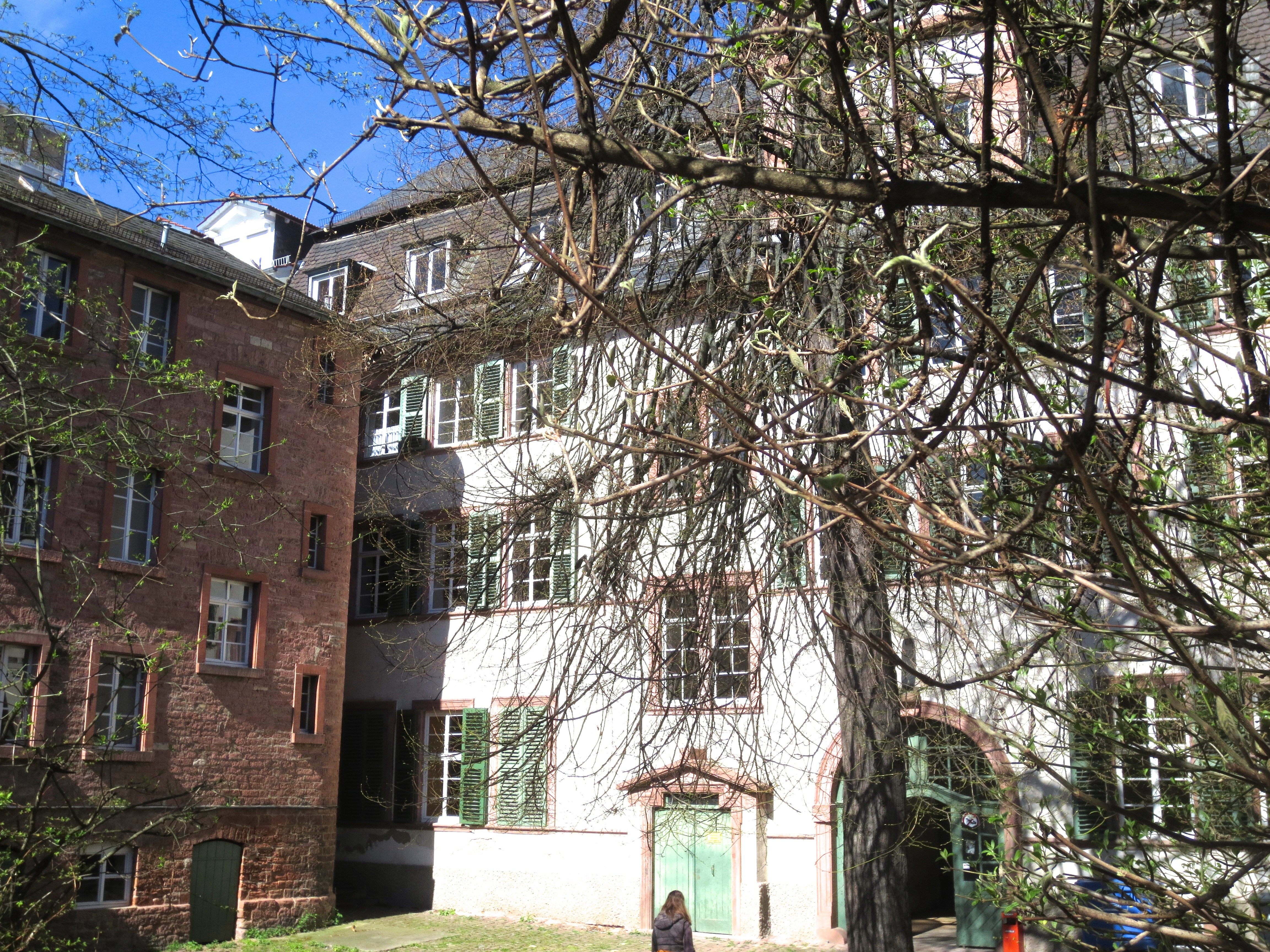 III. Heidelberg Altstadt Campus Universität Heidelberg Haus zum Riesen Hof und Gartenseite Anatomiegarten mit dem westlichen Seitentrakt des Gebäudes aus behauenem Odenwälder Buntsandstein Quadern